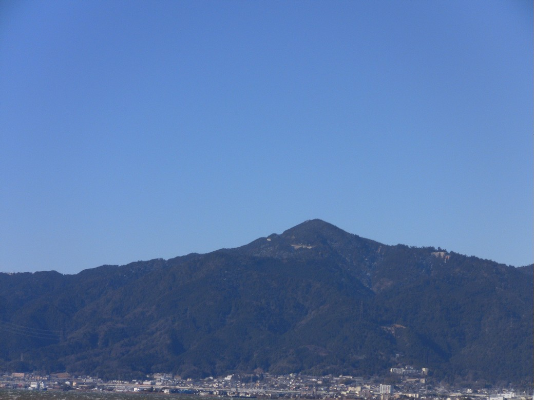 琵琶湖から見た比叡山